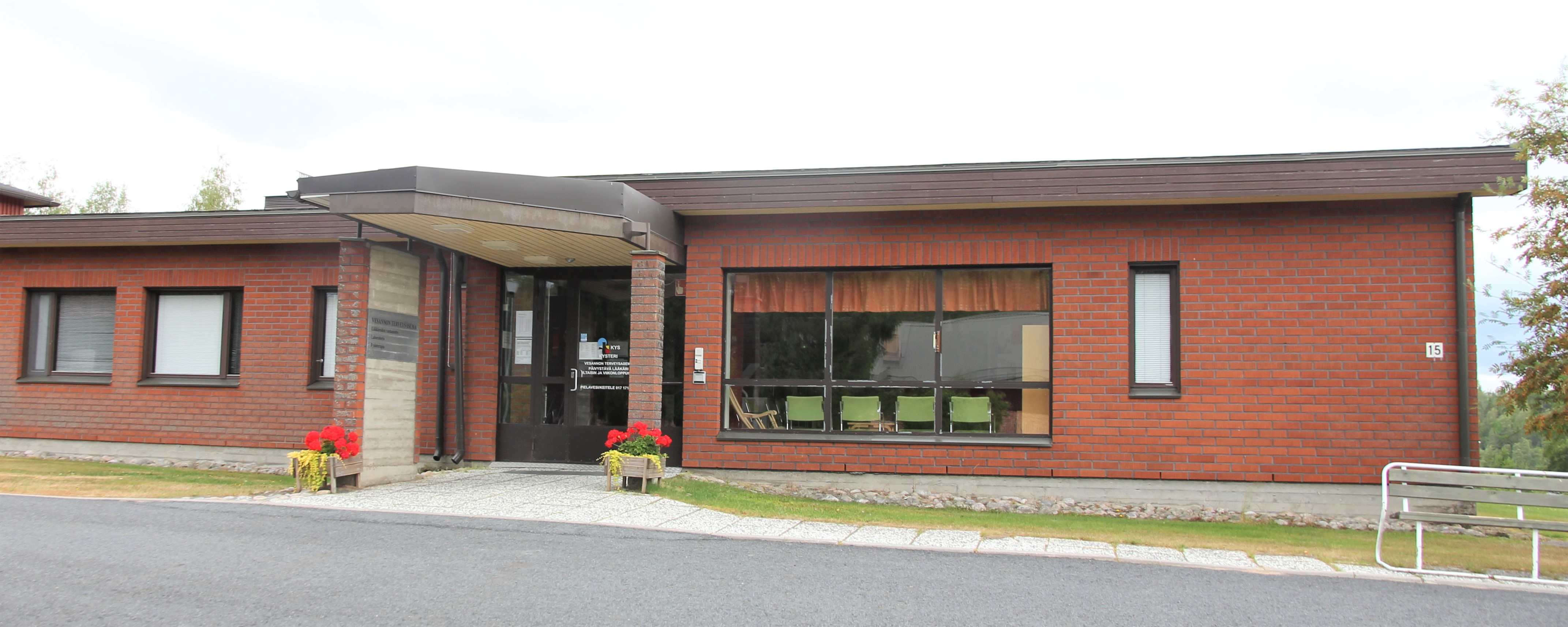 Vesannon terveysasema on julkinen terveysasema, joka toimii Vesannon kirkonkylällä osoitteessa Simolantie 15, Vesanto.